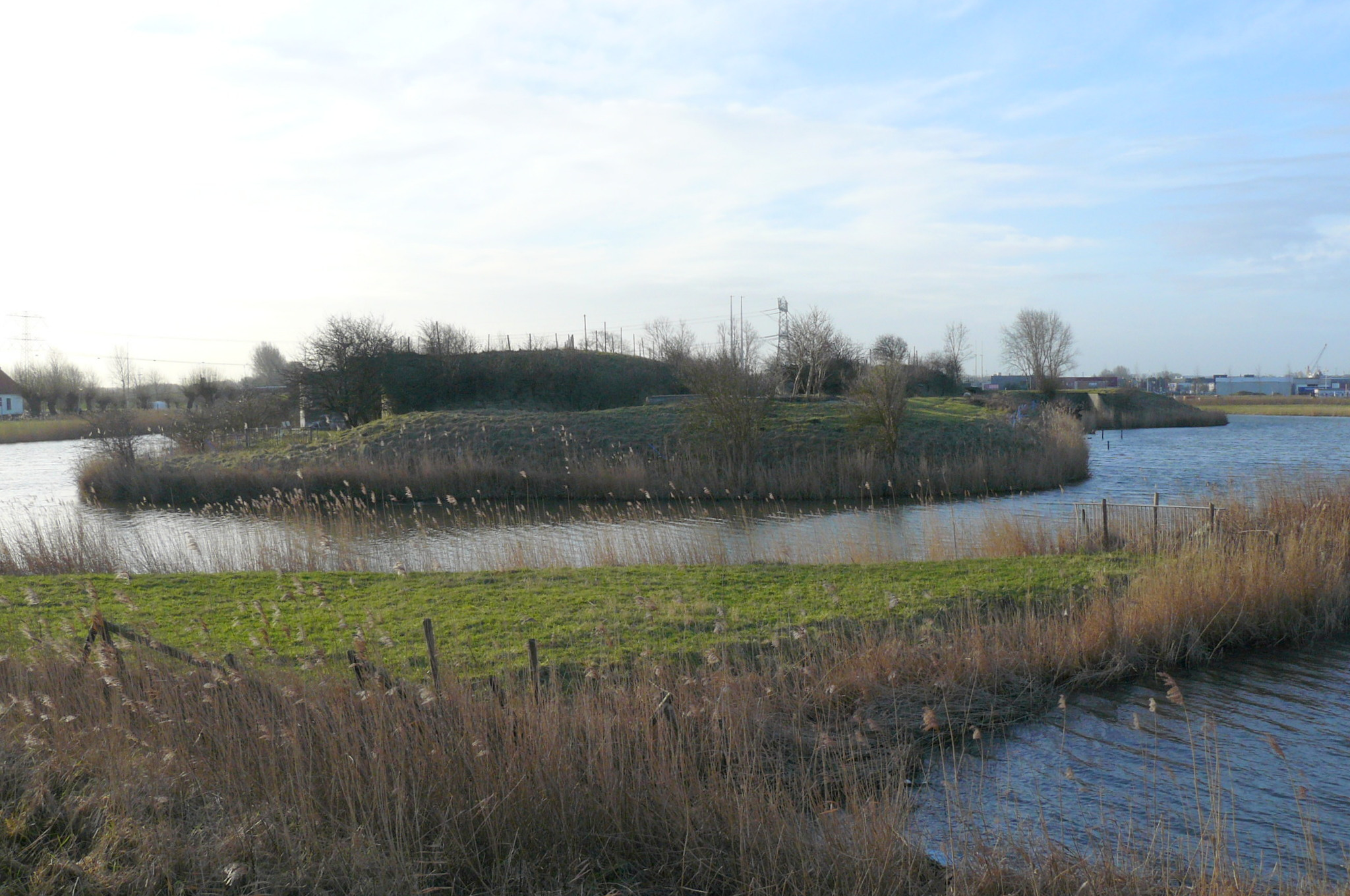 Zijaanzicht van het fort. De foto is genomen van de St. Aagtendijk ter hoogte van de stenen beer en is gericht naar het zuiden. Helemaal rechts van het fort is de front-caponnière te zien. (Fort bij Hoofddorp is het enige van de stelling die er ook een heeft.) De in beton uitgevoerde caponnière werd midden voor in de frontwal geplaatst. Hiermee ontstond een ronde uitbouw in de frontgracht die zijdelings van schietgaten werd voorzien. Aan de voorzijde beschermde een zware aarden dekking de caponnière tegen granaatvuur. Door middel van een poterne (bomvrije gang) stond de uitbouw in verbinding met het frontgebouw.